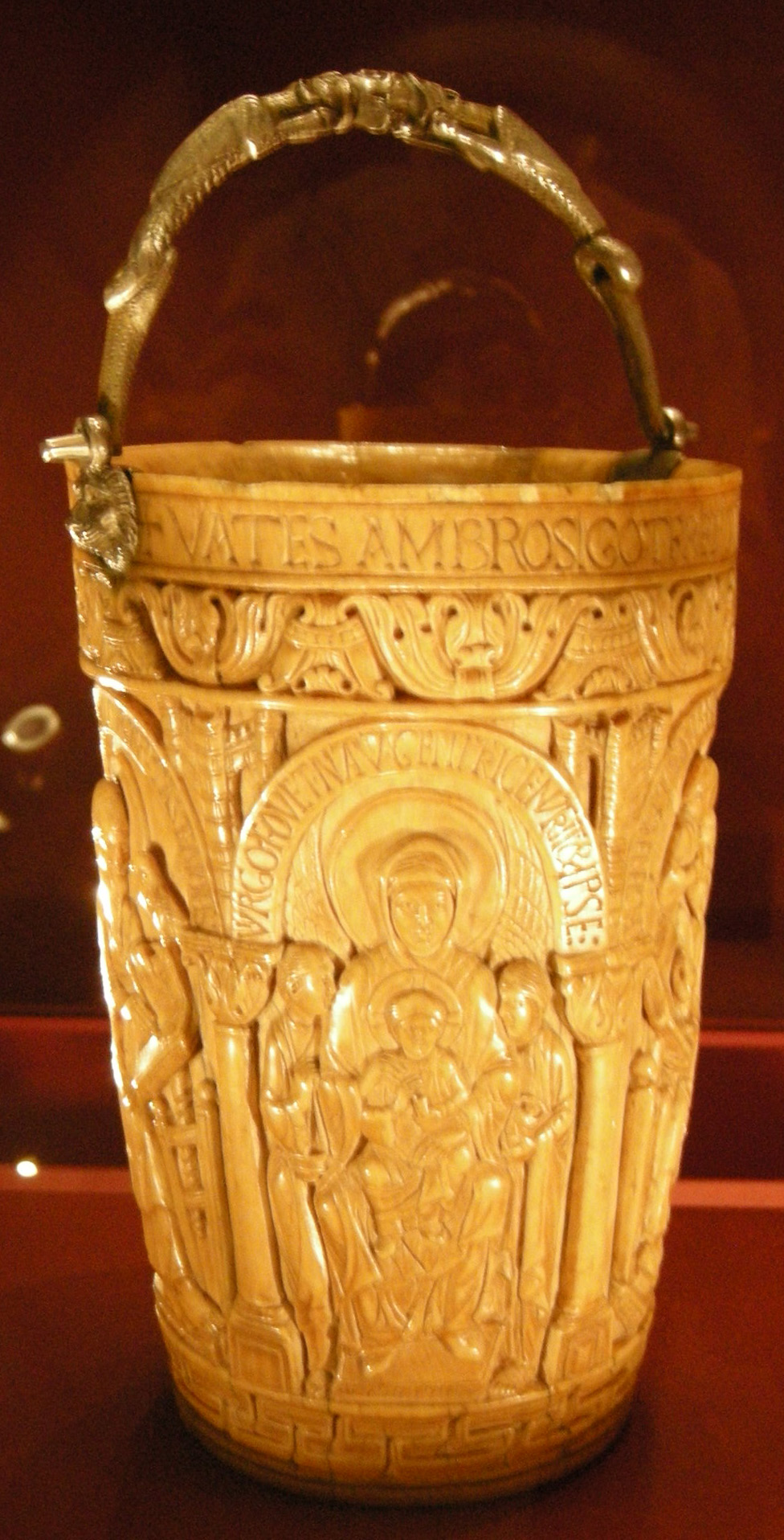 Situla di avorio commissionata da Gotofredo (protetto di Ottone II e dal sovrano insediato sulla cattedra vescovile ambrosiana) dedicata allo stesso Ottone, veniva utilizzata nelle cerimonie imperiali. Entro una serie di arcate risiedono la Vergine con Bambino tra due angeli ed i quattro evangelisti.